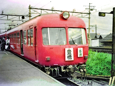 名鉄5000系電車